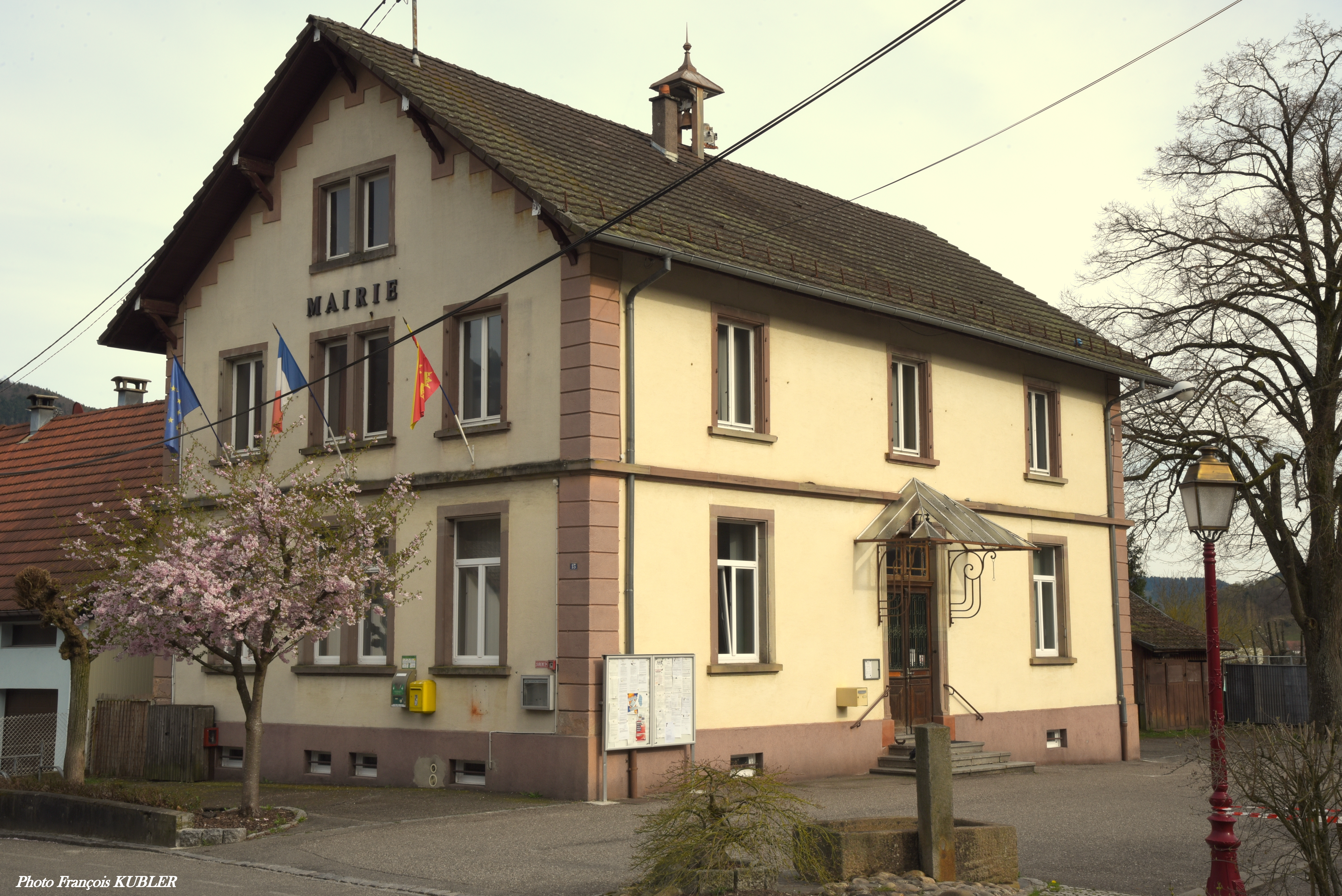 Vue de la Mairie de Malmerspach 2017